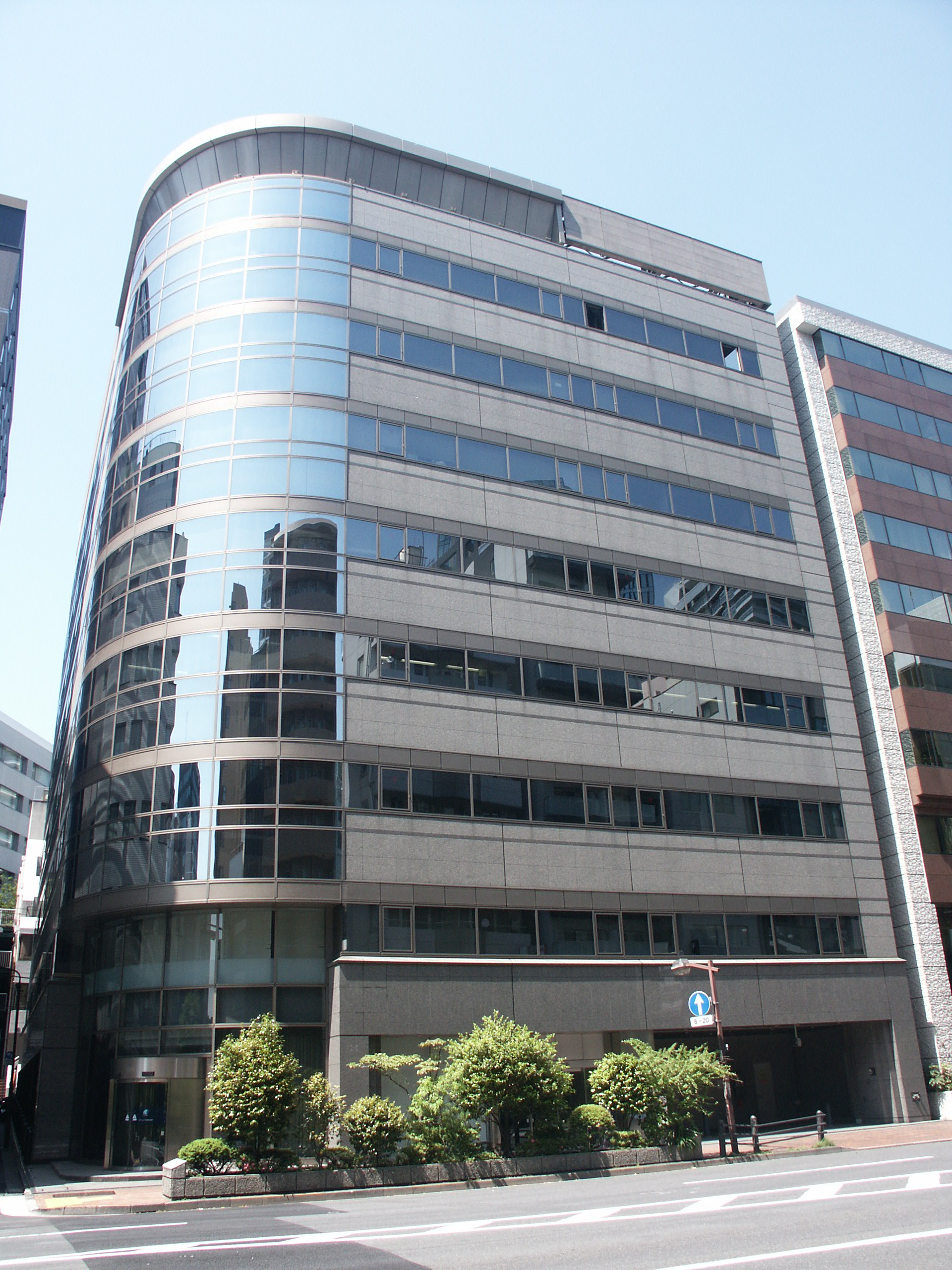 東京都千代田区飯田橋に所在する教販九段ビル